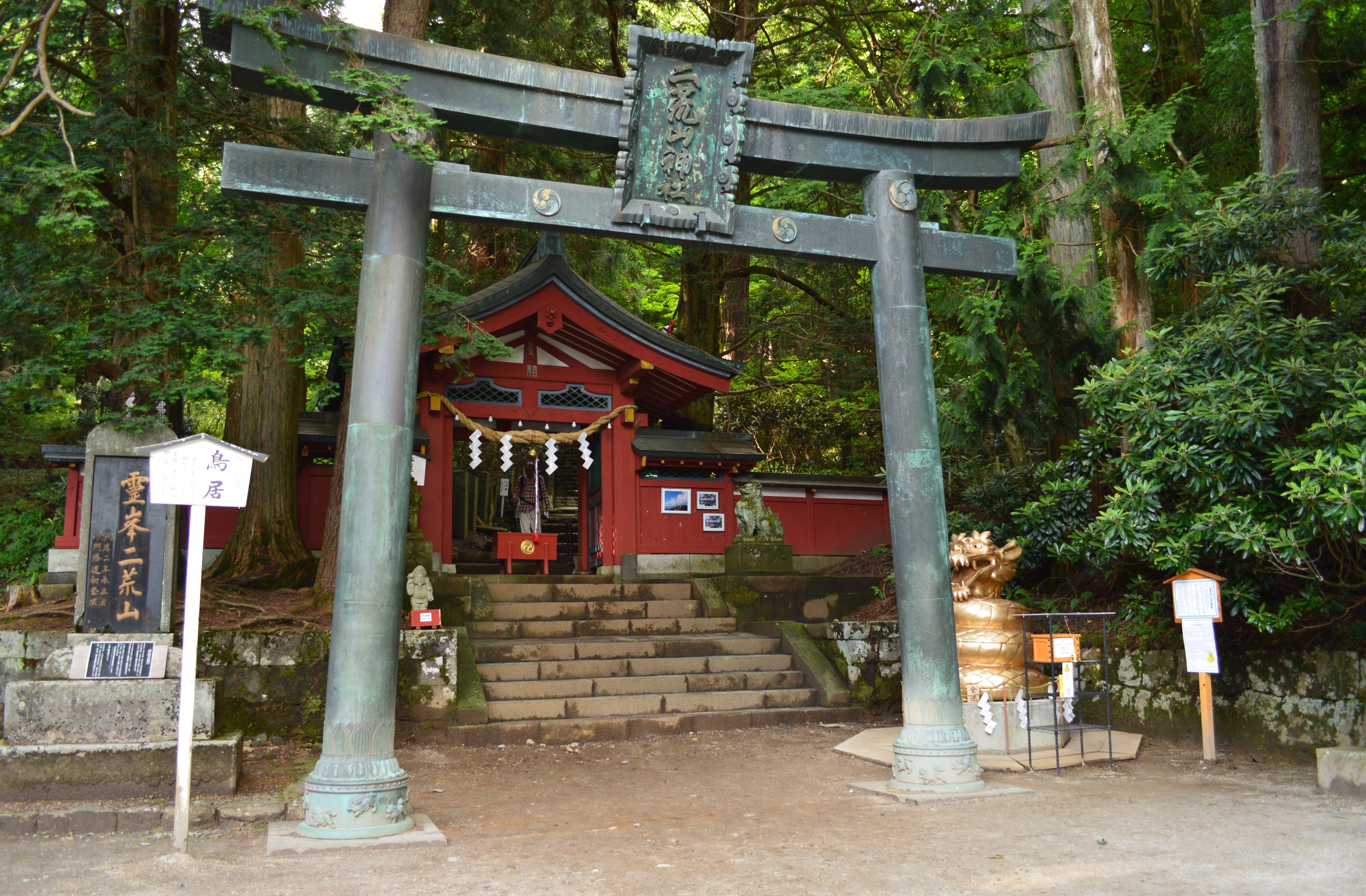 日光二荒山神社 中宮祠 鳥居 (登拝口)